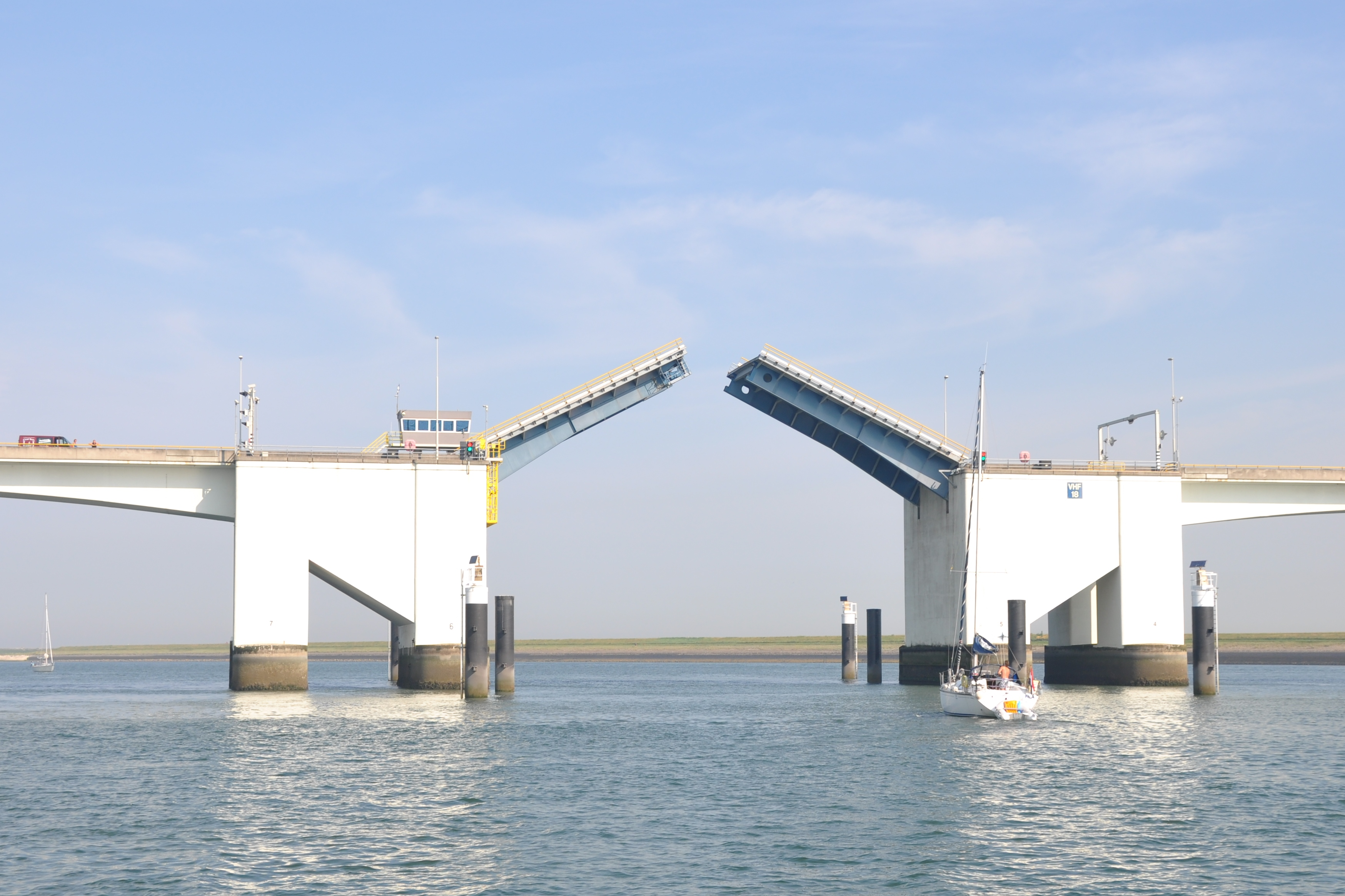 Openstaande Zeelandbrug voor Nederlands zeiljacht.